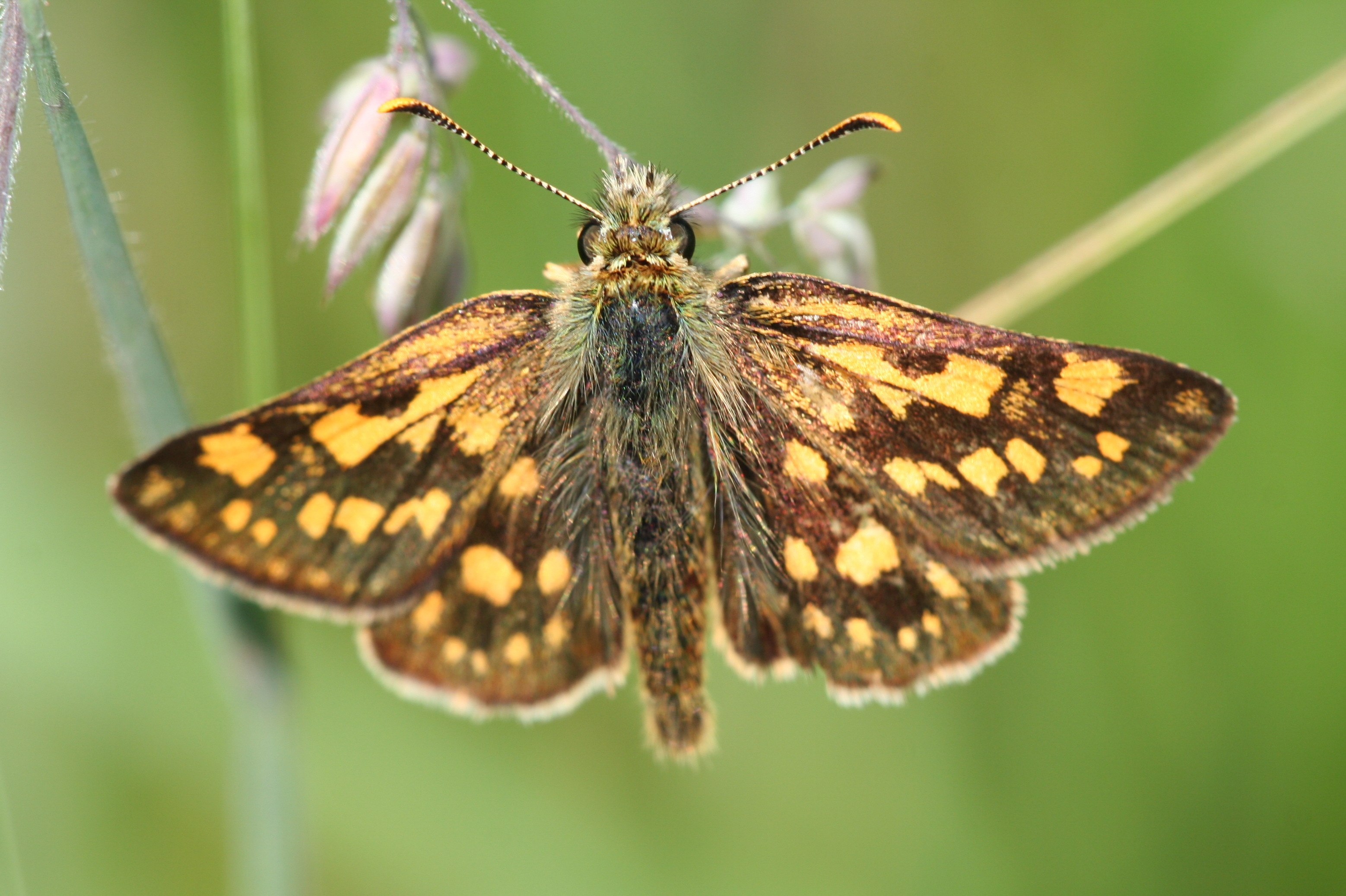 Carterocephalus palaemon